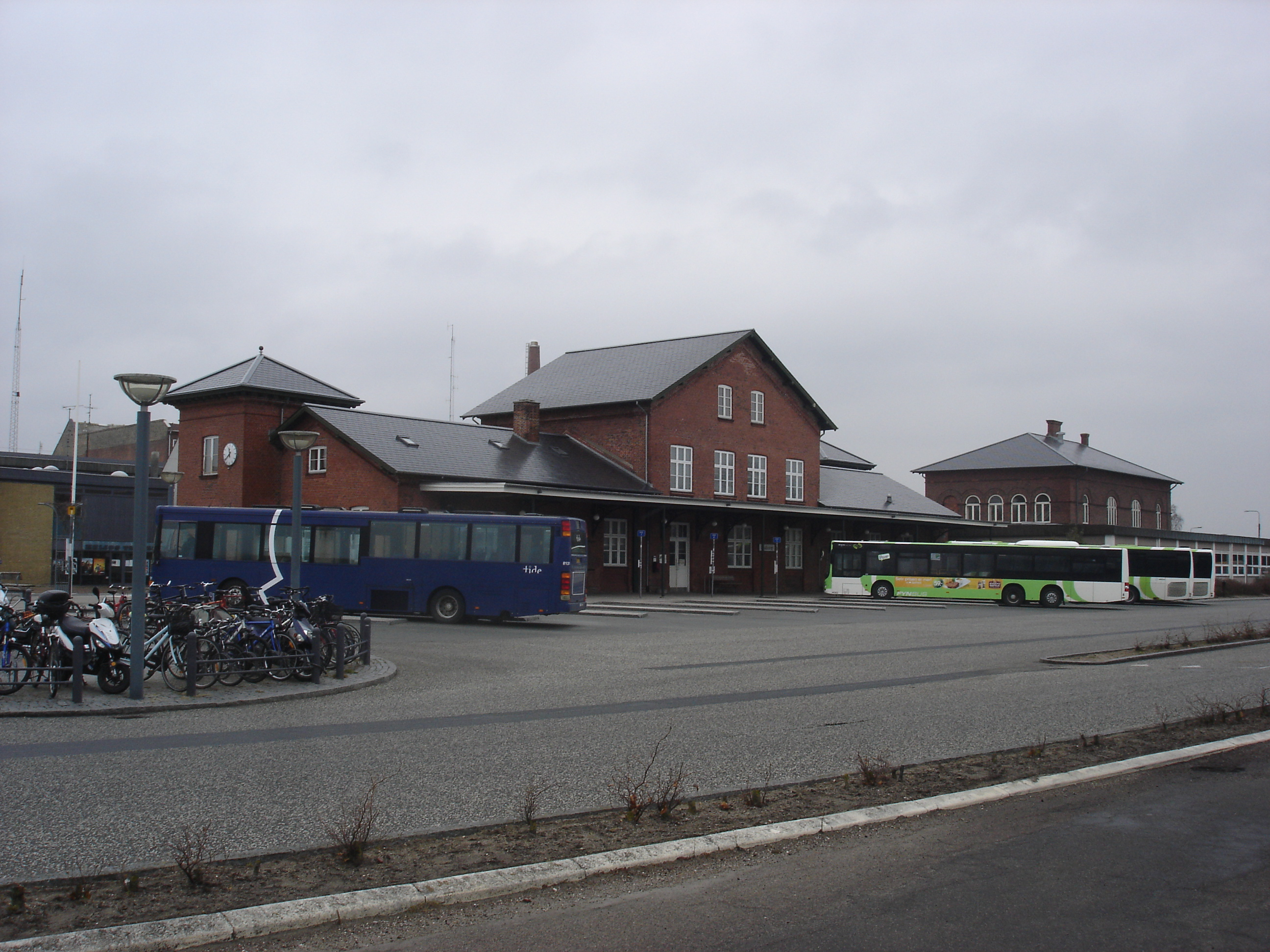 Faaborg Banegård fra sporsiden